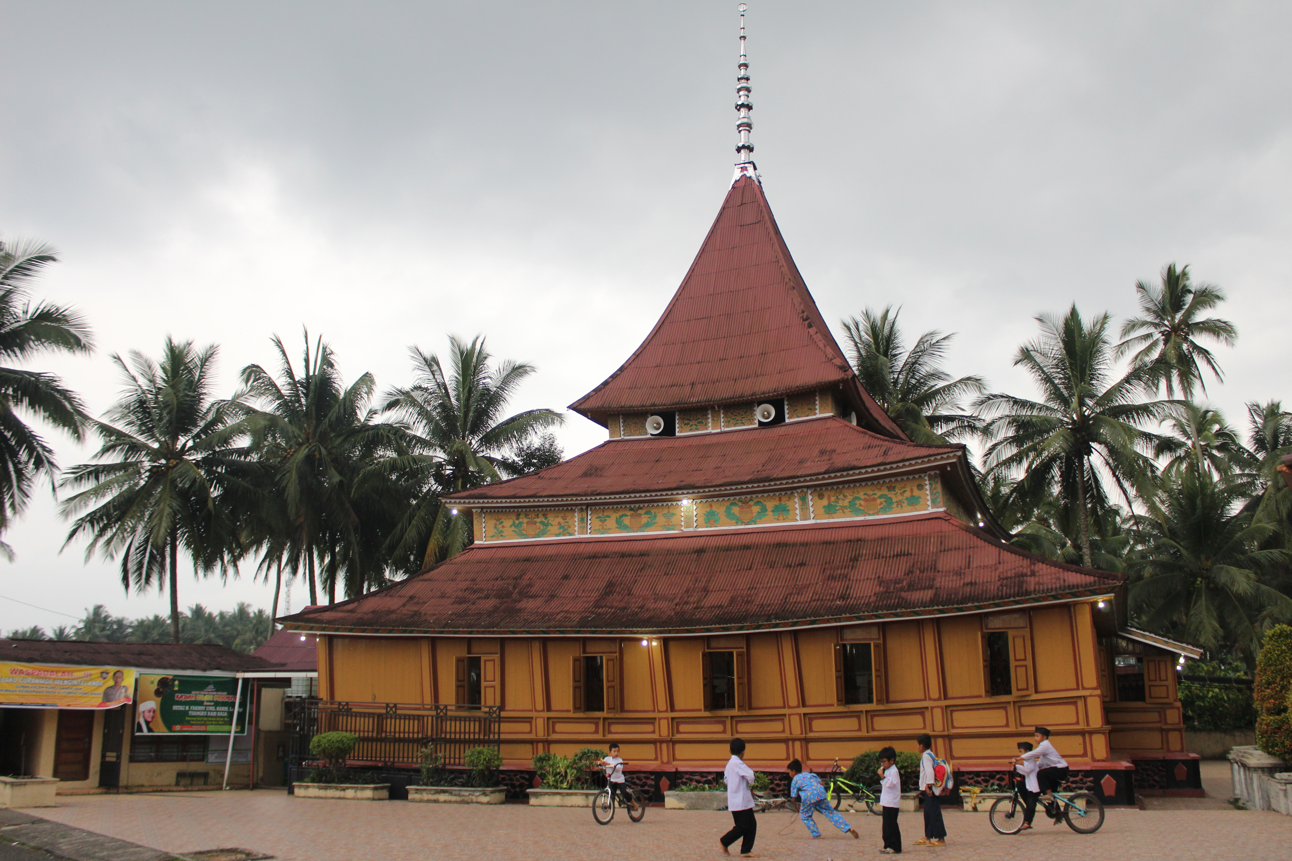 Masjid Tuo Koto Nan Ampek di Payakumbuh, Sumatra Barat, Indonesia.